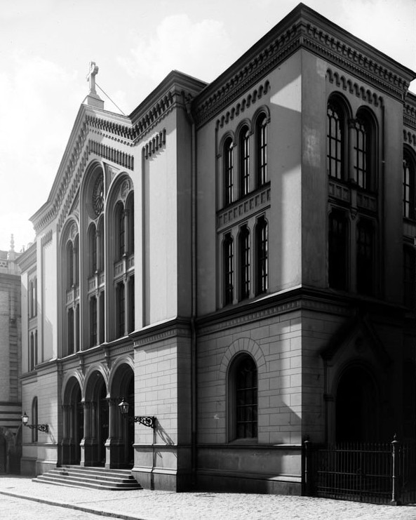 Blasieholmskyrka i Stockholm